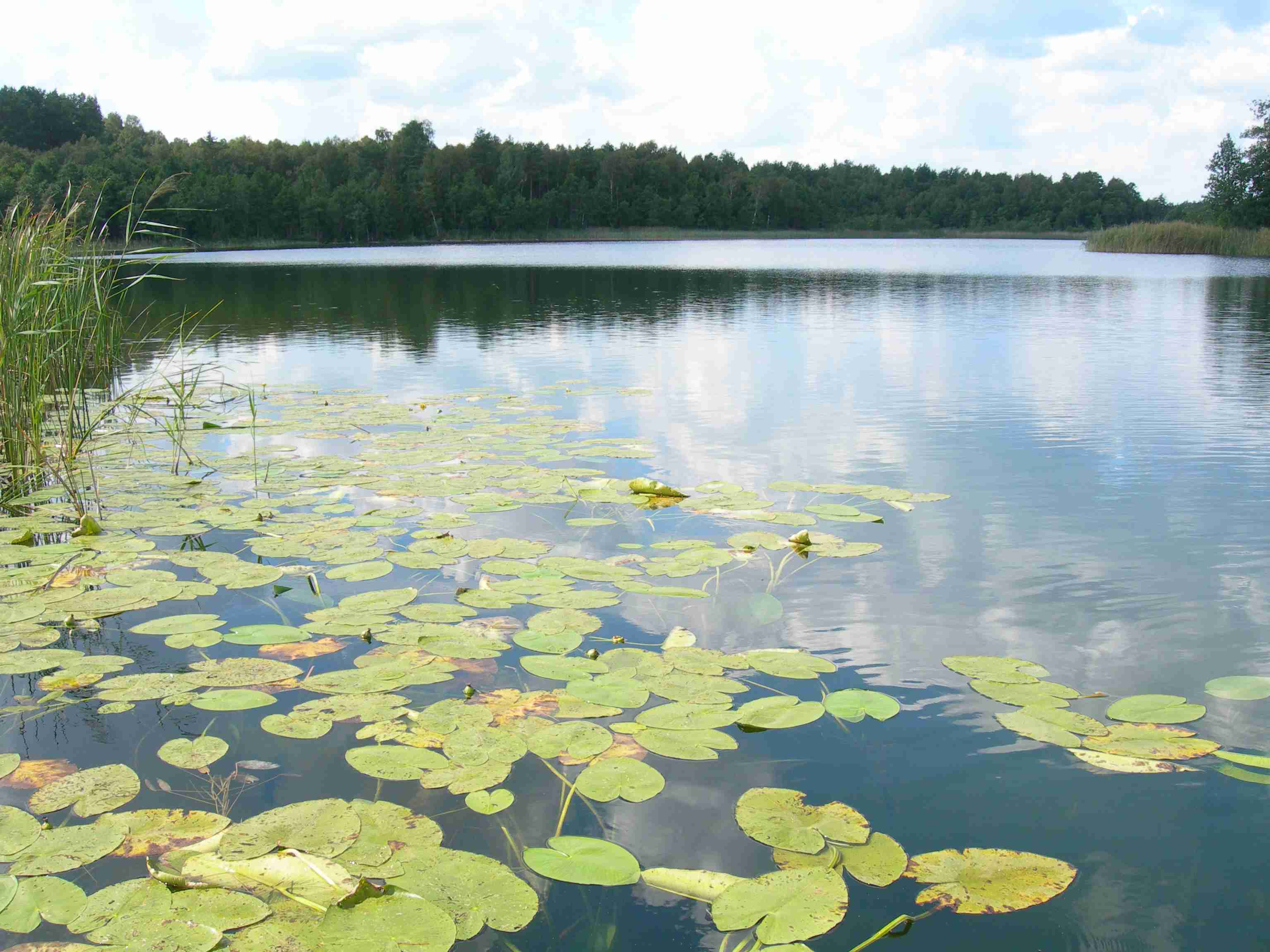 Juodieji Lakajai, sasiaurio vieta